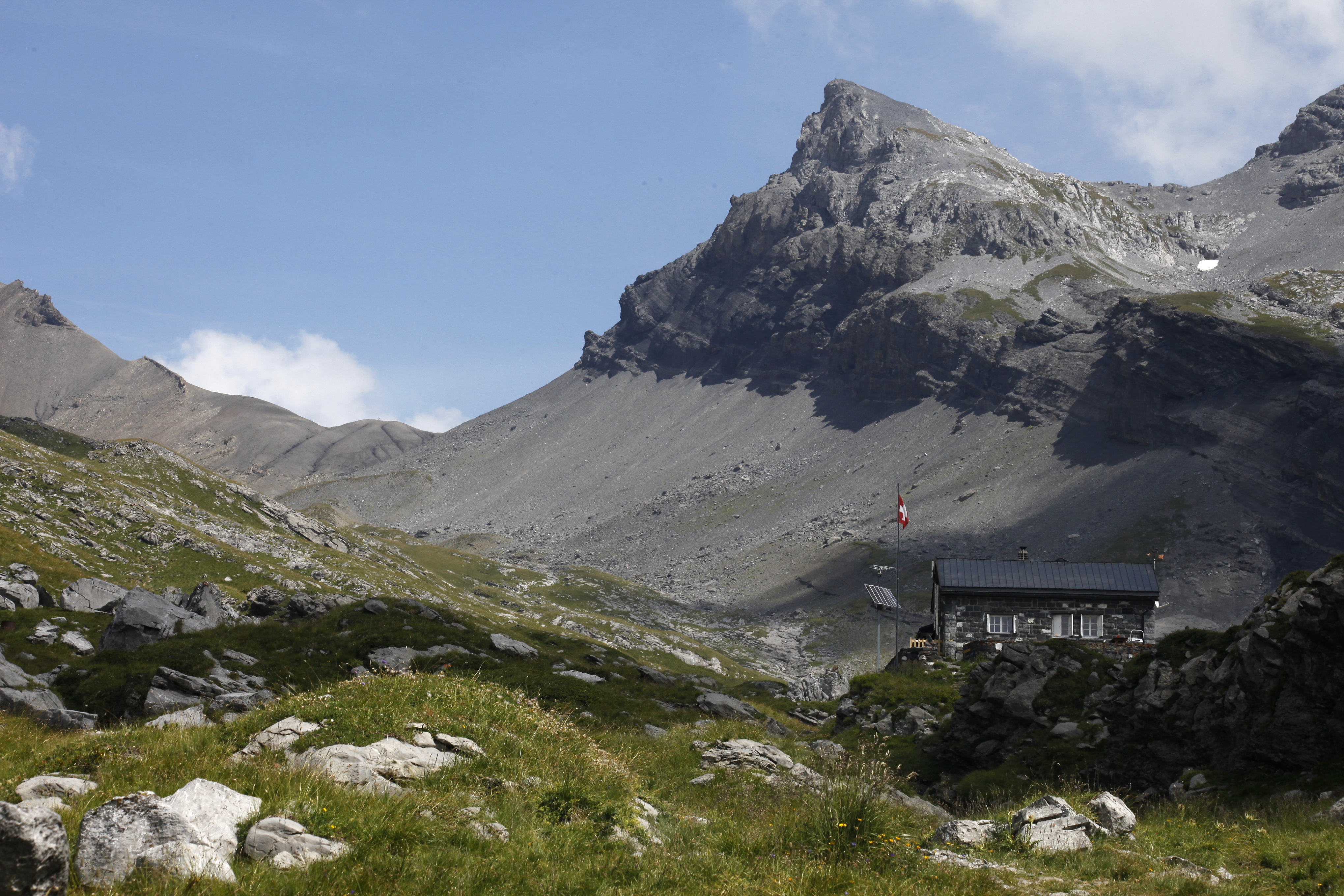 Le refuge de Susanfe.